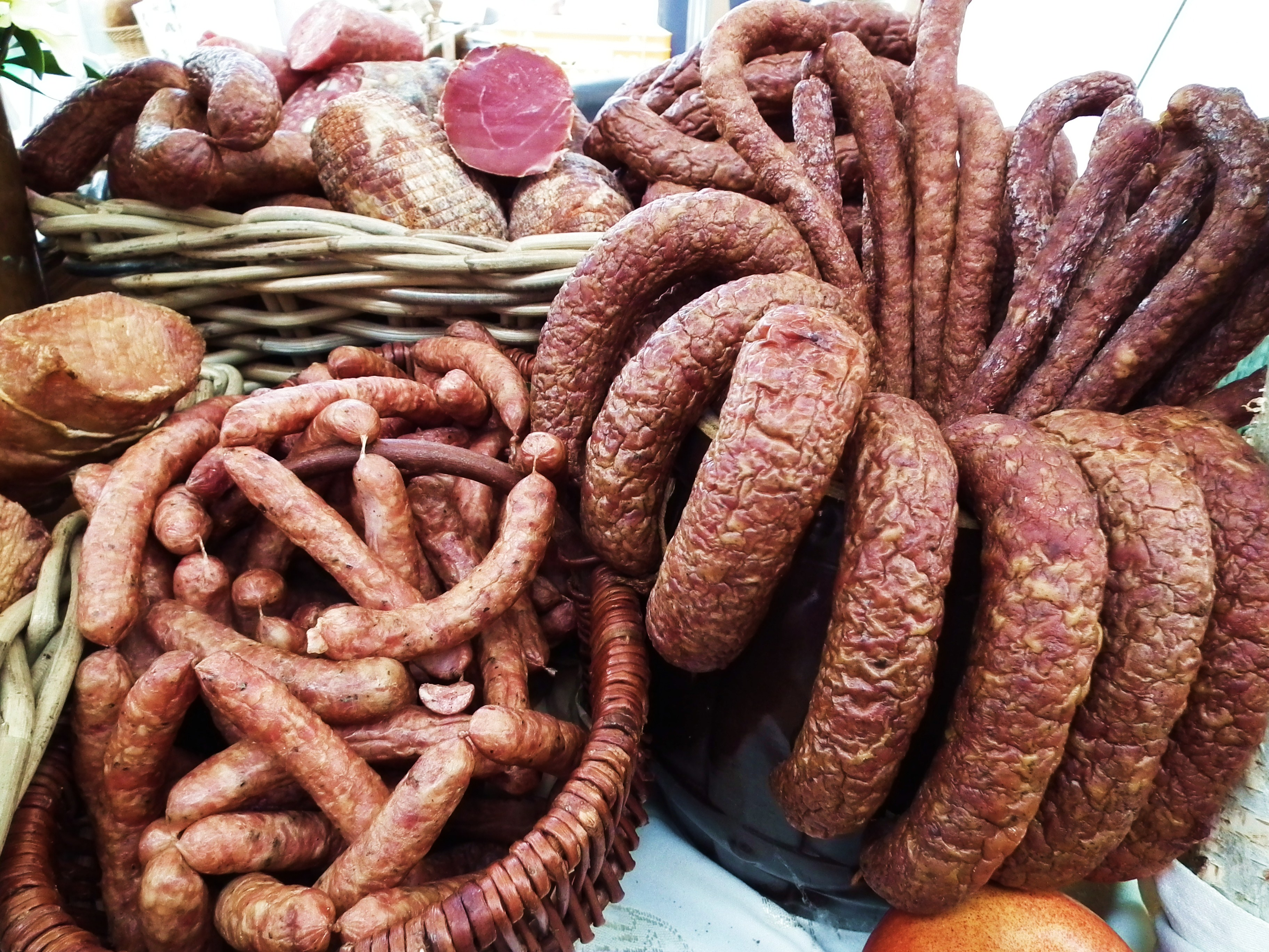 Targi Smaki Regionów 2016 w Poznaniu.